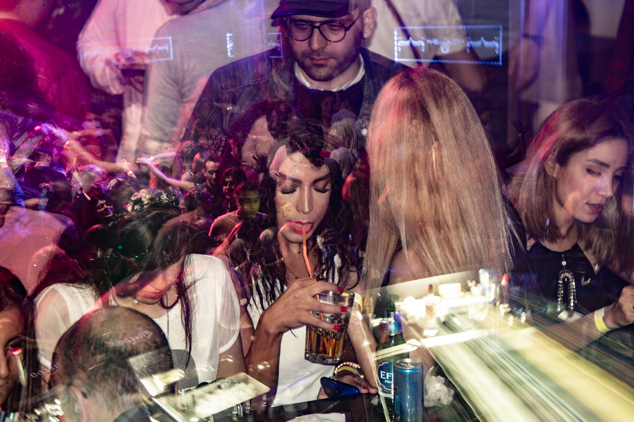 عکس توسط پوریا افخمی در کلاب سِنات شهر تفلیس ثبت شده است.